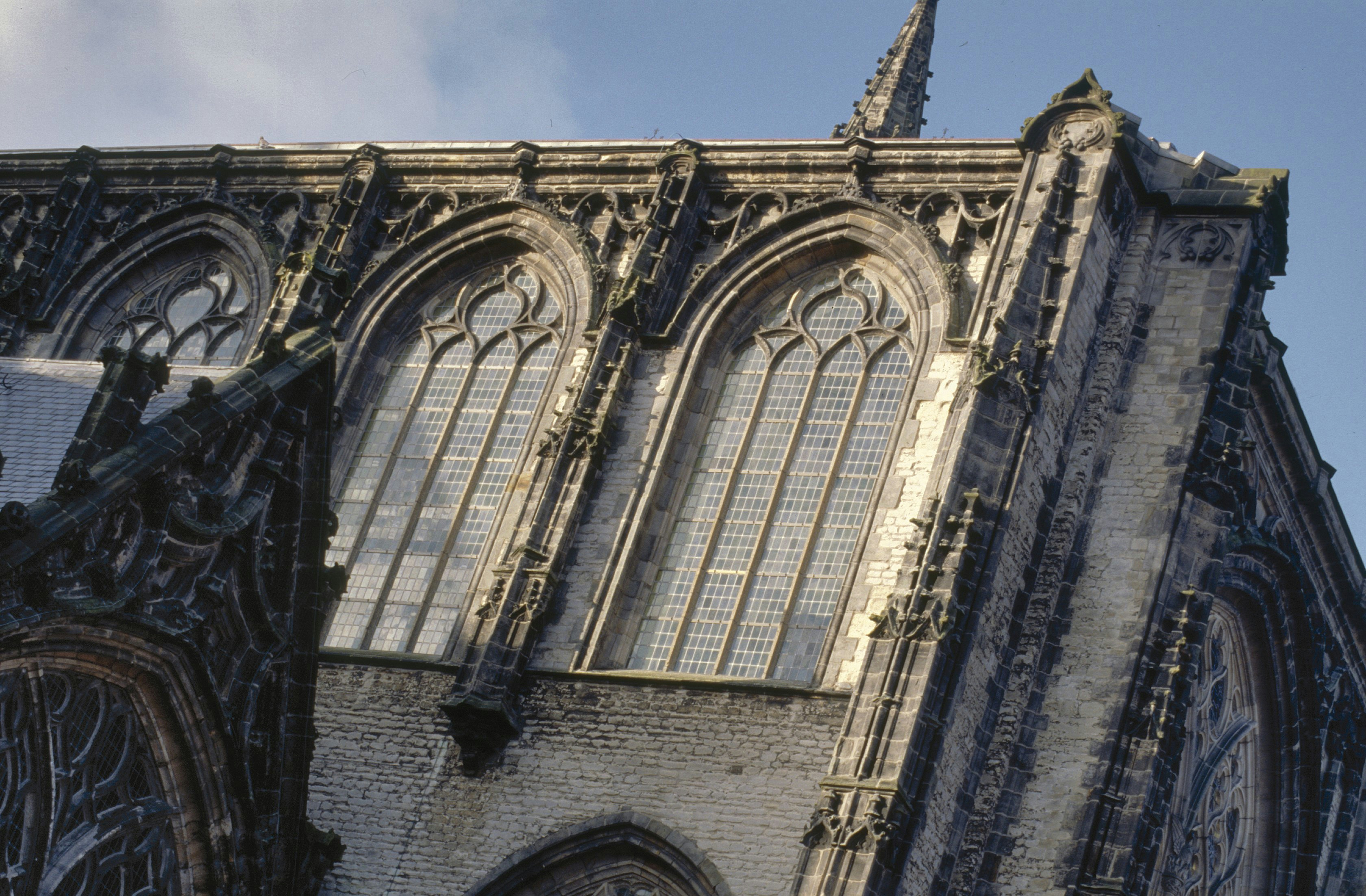 Oude Kerk: Lichtbeuk in de oostgevel van de noorderdwarsarm